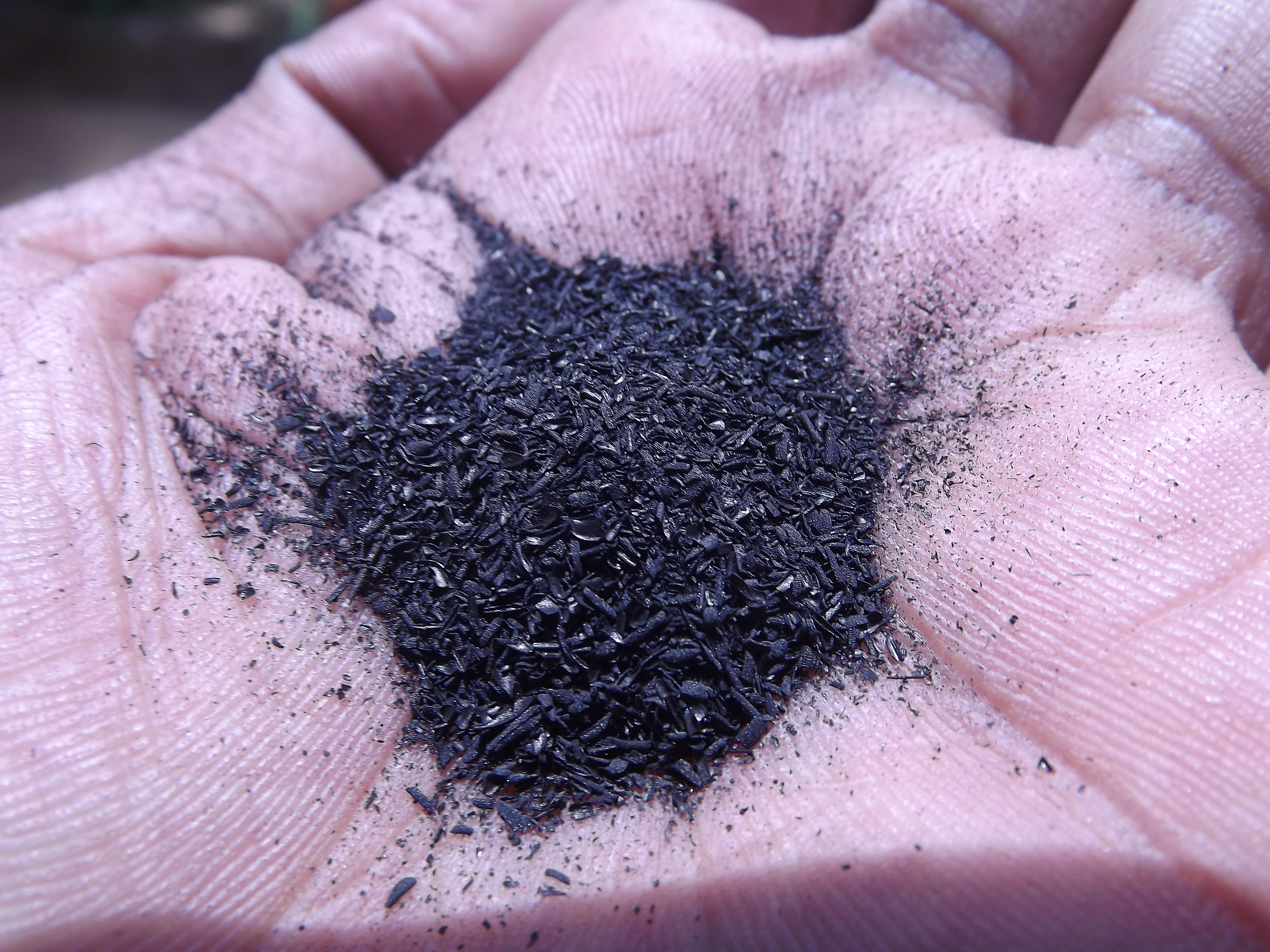 നെല്ലിന്റെ പുറം‌പാളിയായ ഉമി കരിച്ചാൽ ലഭിക്കുന്നതാണ് ഉമിക്കരി. കേരളീയർ പല്ല് വൃത്തിയാക്കാൻ ഇത് ഉപയോഗിക്കാറുണ്ട്. നെല്ലിനെ പൊതിഞ്ഞിരിക്കുന്ന ആവരണമാണ് ഉമി. നെല്ല് പൂവായിരിക്കുമ്പോൾ കാണപ്പെടുന്ന രണ്ട് ദളങ്ങളാണ് അരിയായി മാറുന്ന നേരത്ത് ആവരണമായി കാണുന്നത്. നെല്ല് കുത്തിയിട്ട് അരി ശേഖരിക്കുമ്പോൾ വെളിയിൽ വരുന്ന ഭാരം കുറഞ്ഞ തോടിനെ ഉമിയെന്ന് പറയുന്നു. ഉമിക്കരി നന്നായി പൊടിച്ച് വിരലിലെടുത്ത് പല്ലുകളിൽ ഉരയ്ക്കുമ്പോൾ പല്ലിൽ അടിഞ്ഞുകൂടിയ മാലിന്യങ്ങൾ നശിച്ച് പല്ല് വൃത്തിയാവുന്നു.